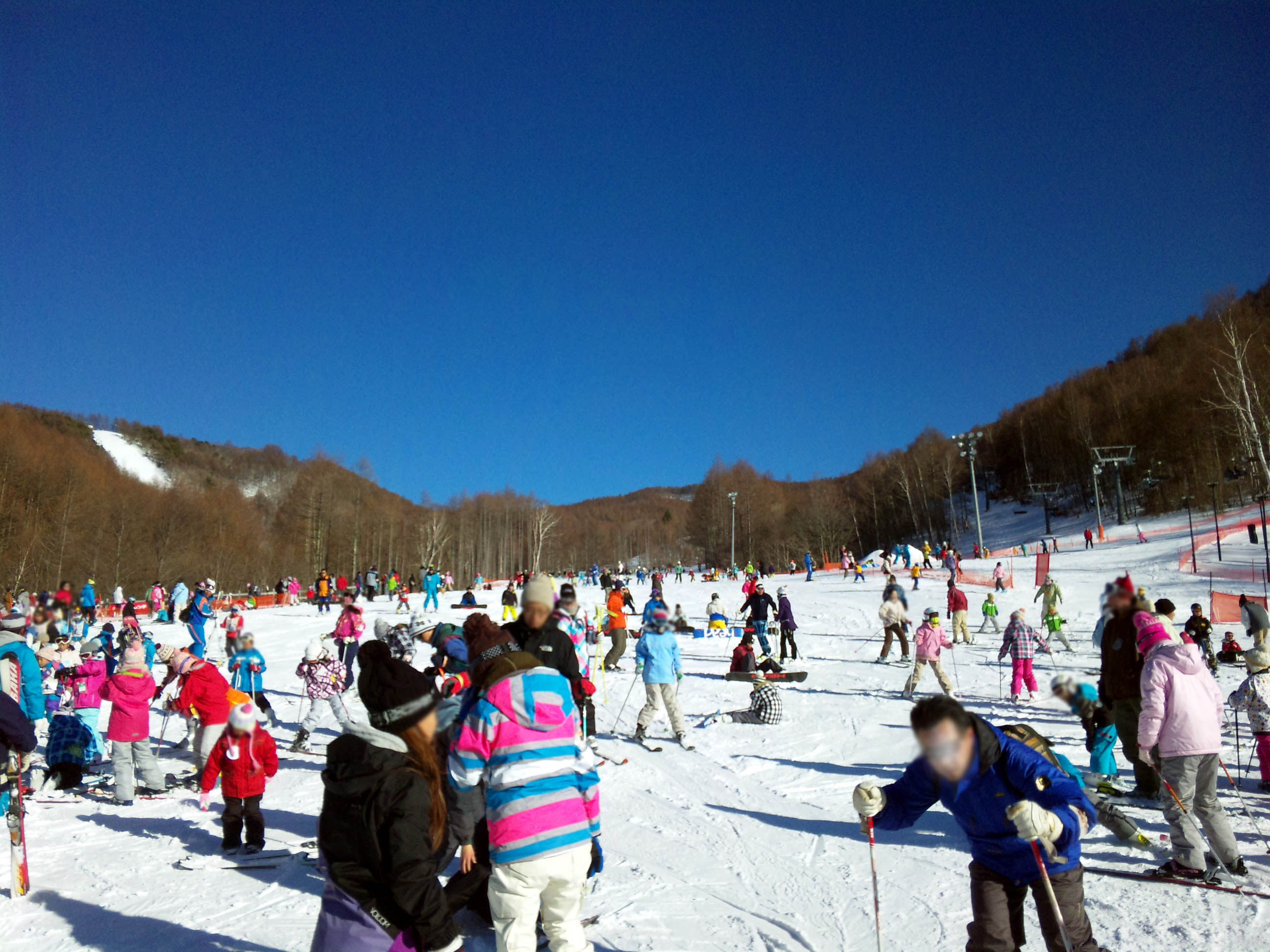 シャトレーゼスキーリゾート八ヶ岳 ドコモ携帯電話 SH-01Bにて撮影